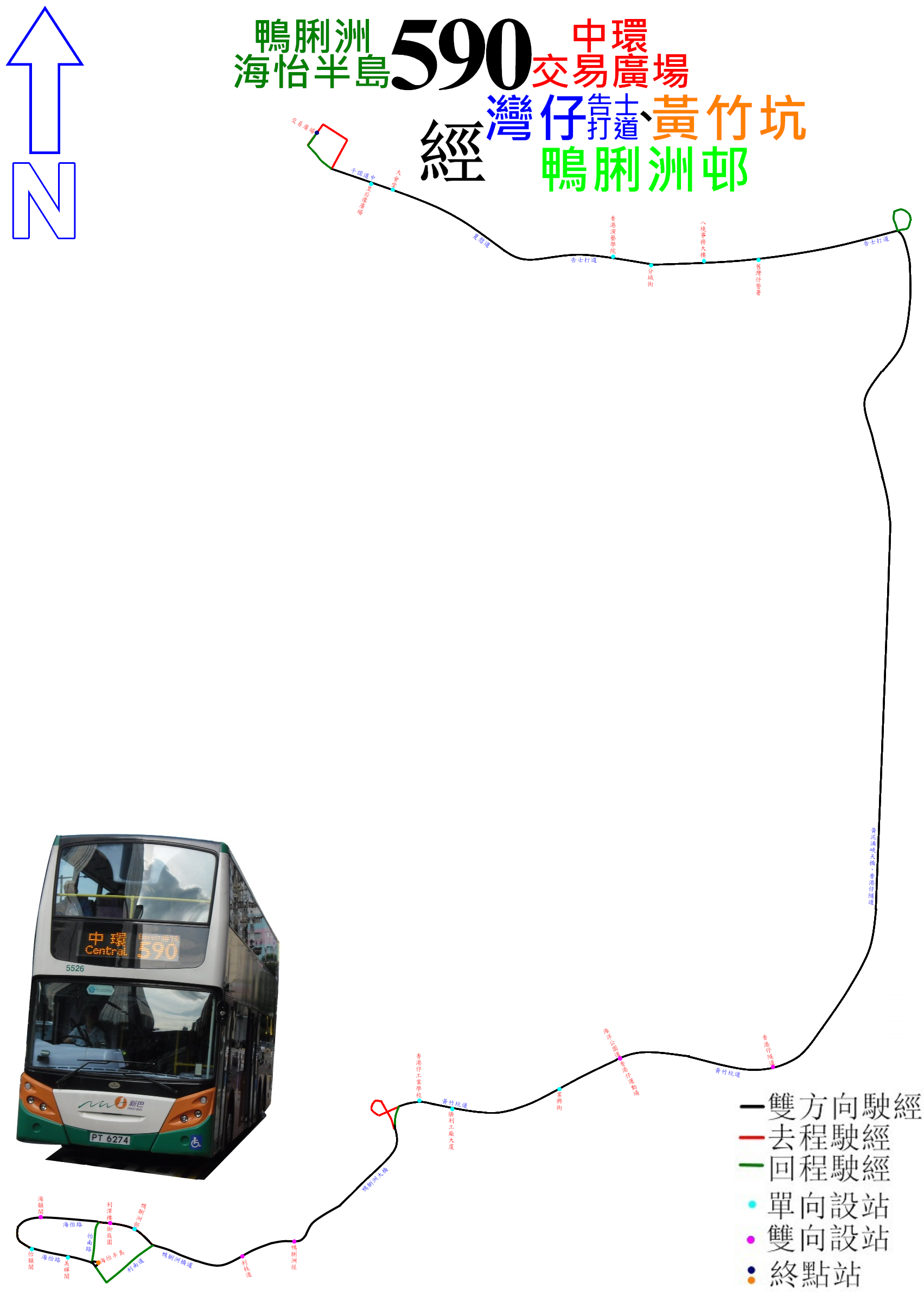 中文（香港）: 新巴590線的走線圖